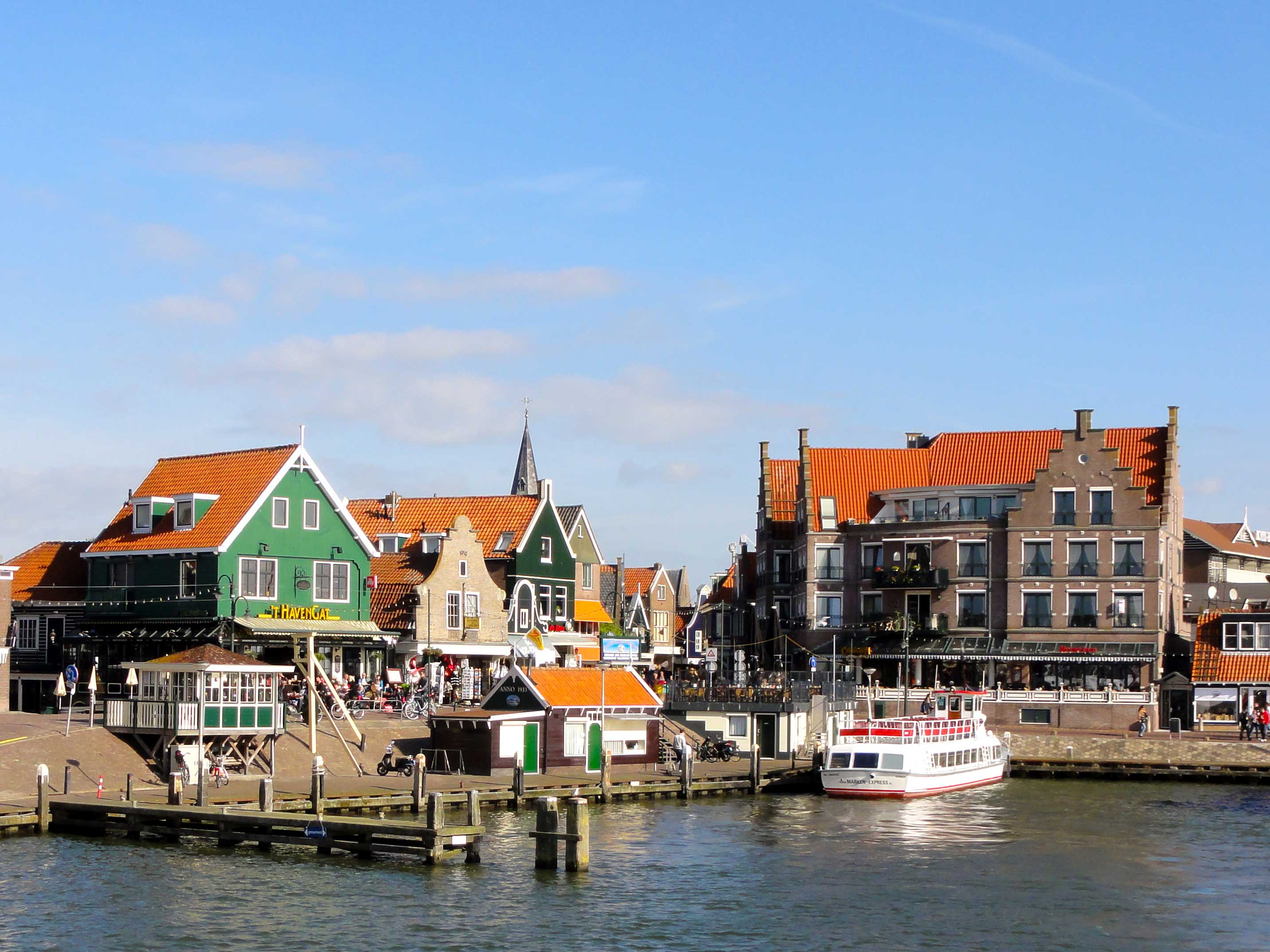 Molen de Kathammer nabij Volendam